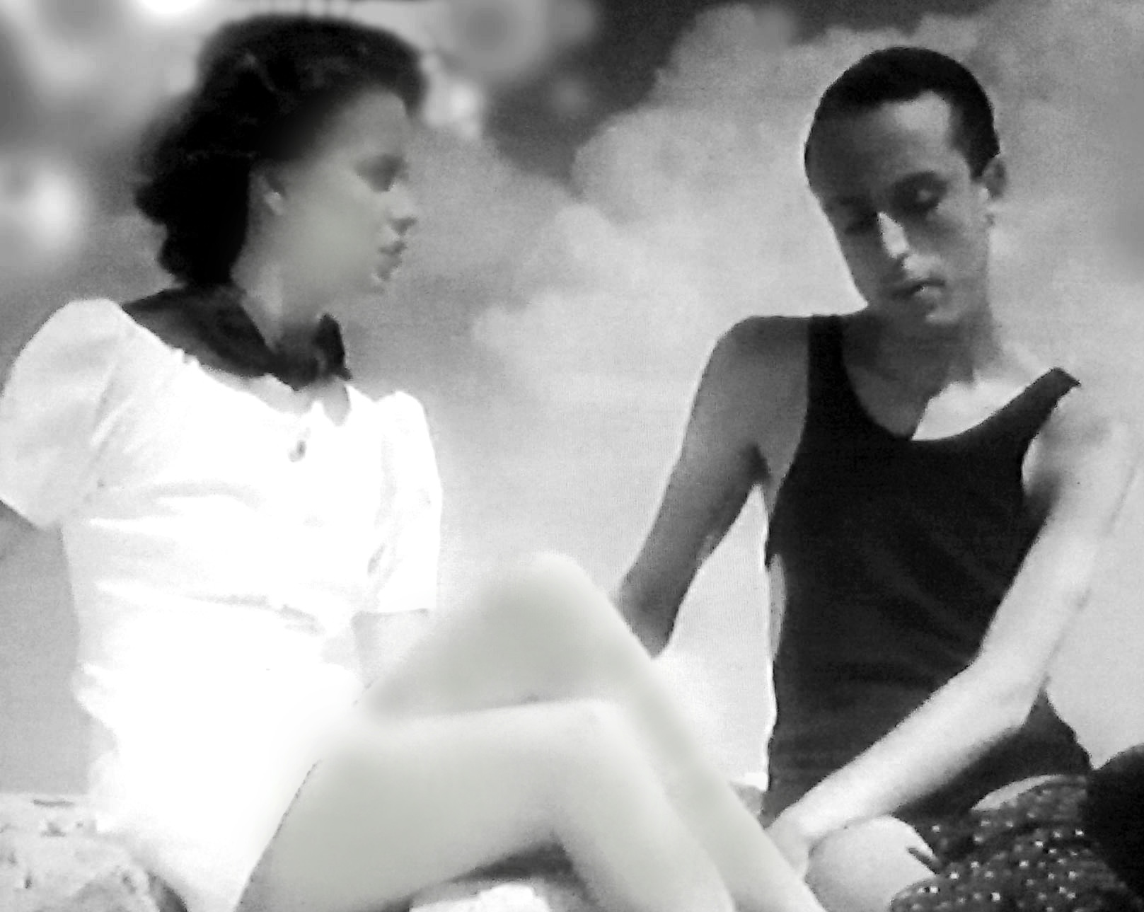 Alida Valli ed Albino Principe in una scena di "Sono stato io!" (Matarazzo, 1937)